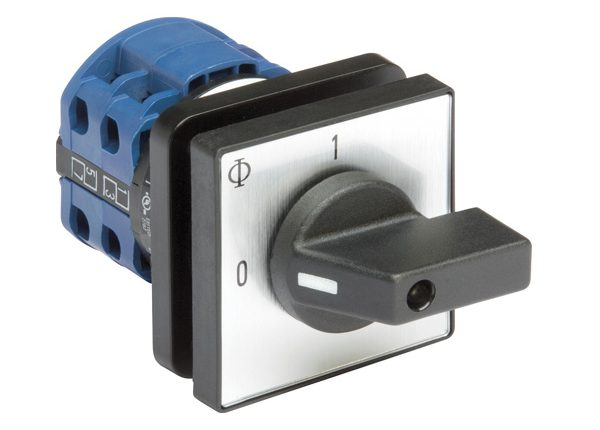 Foto de Comutador Rotativo